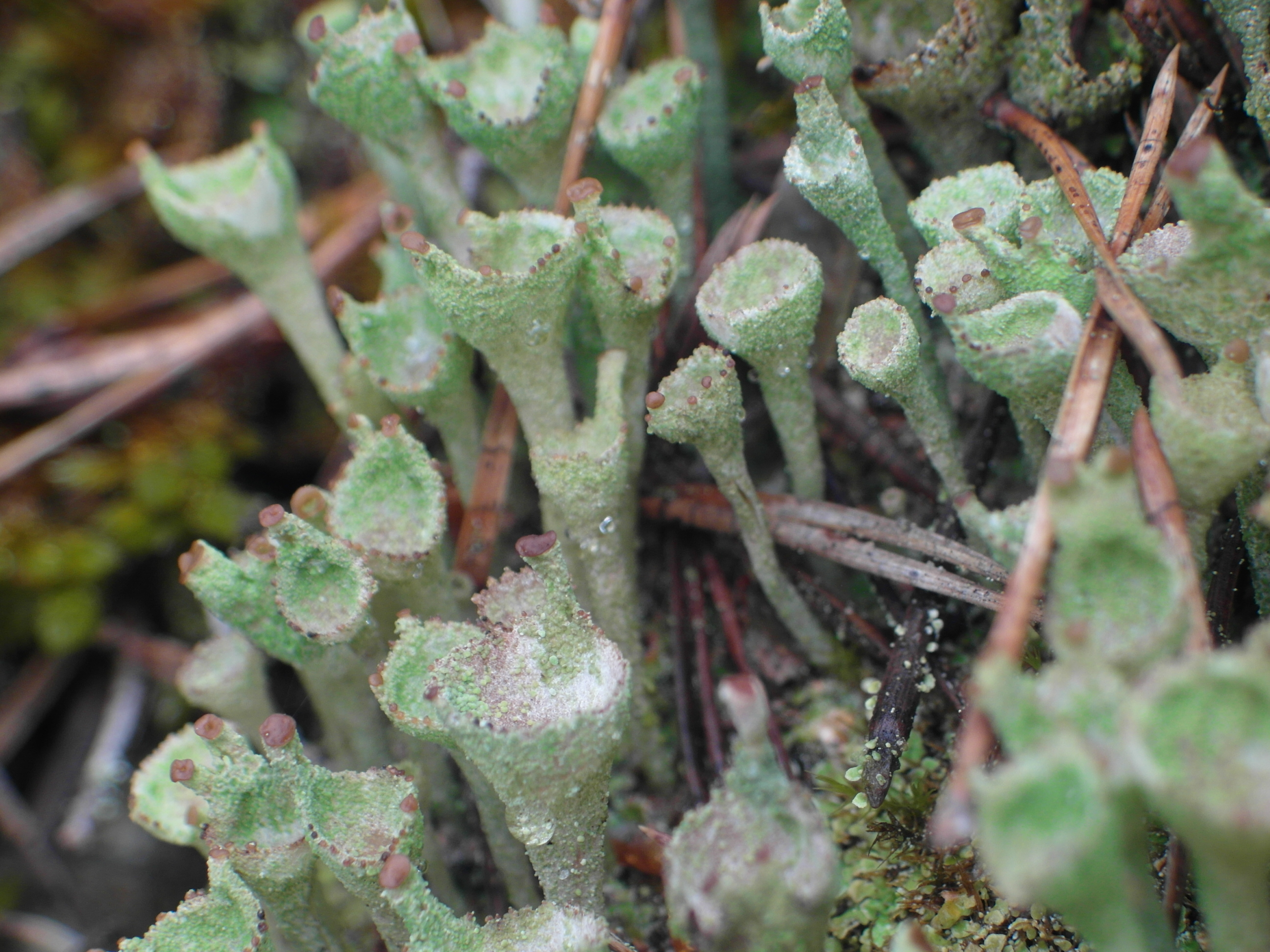 braunfrüchtige Becherflechte (Cladonia pyxidata), auch Echte Becherflechte